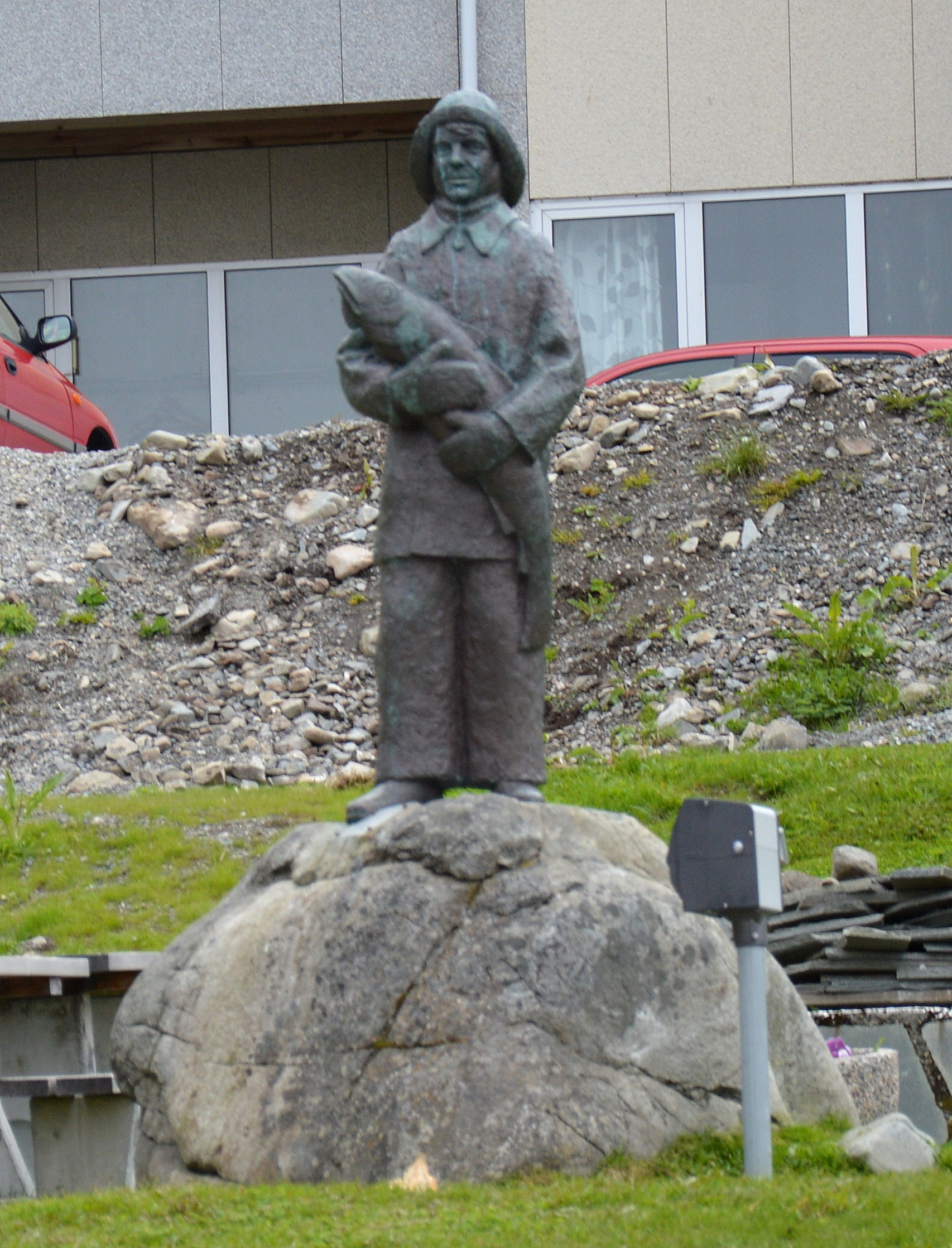 Skarungen